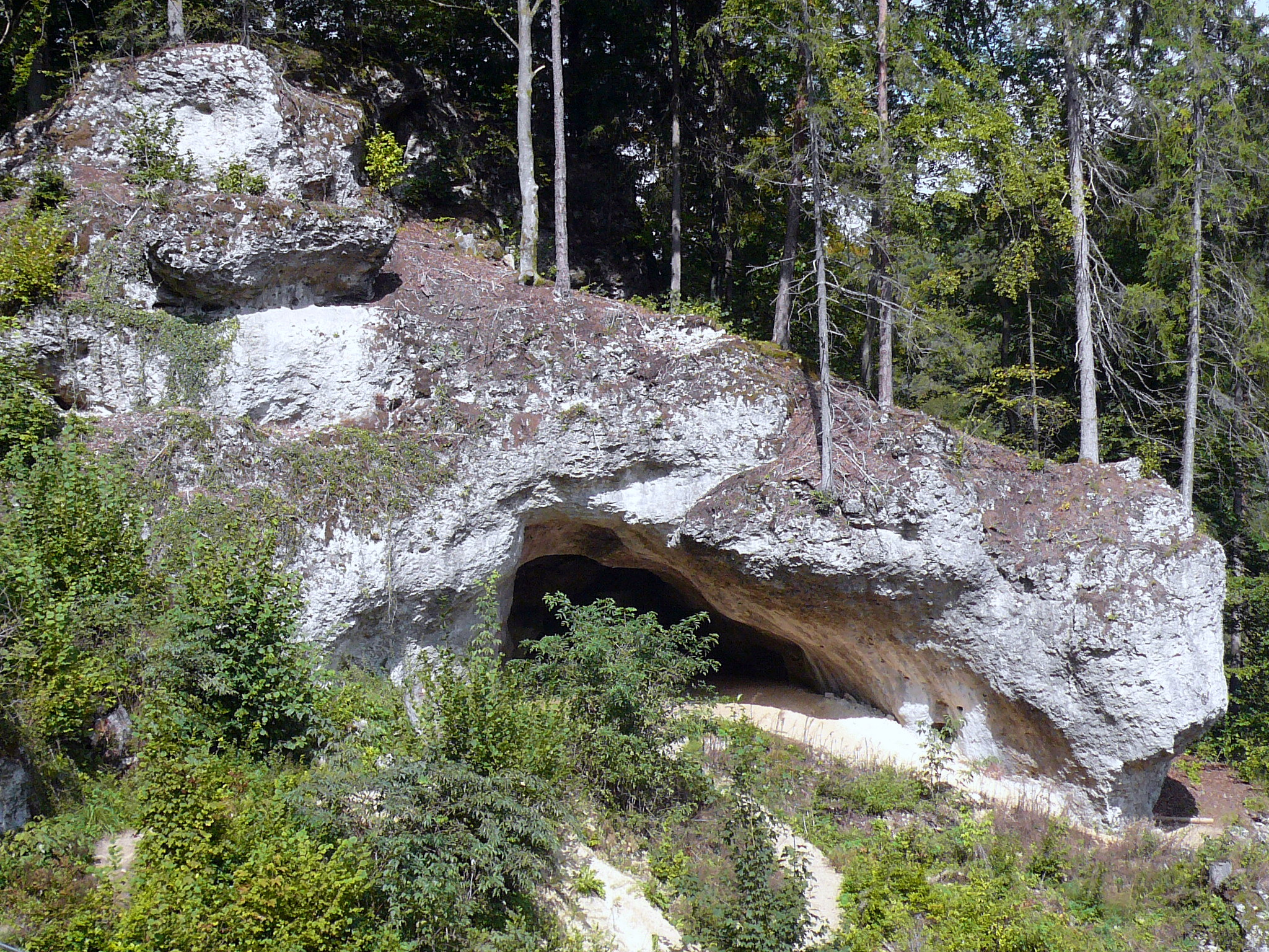 Teufelshöhle bei Pottenstein, Kleine Teufelshöhle